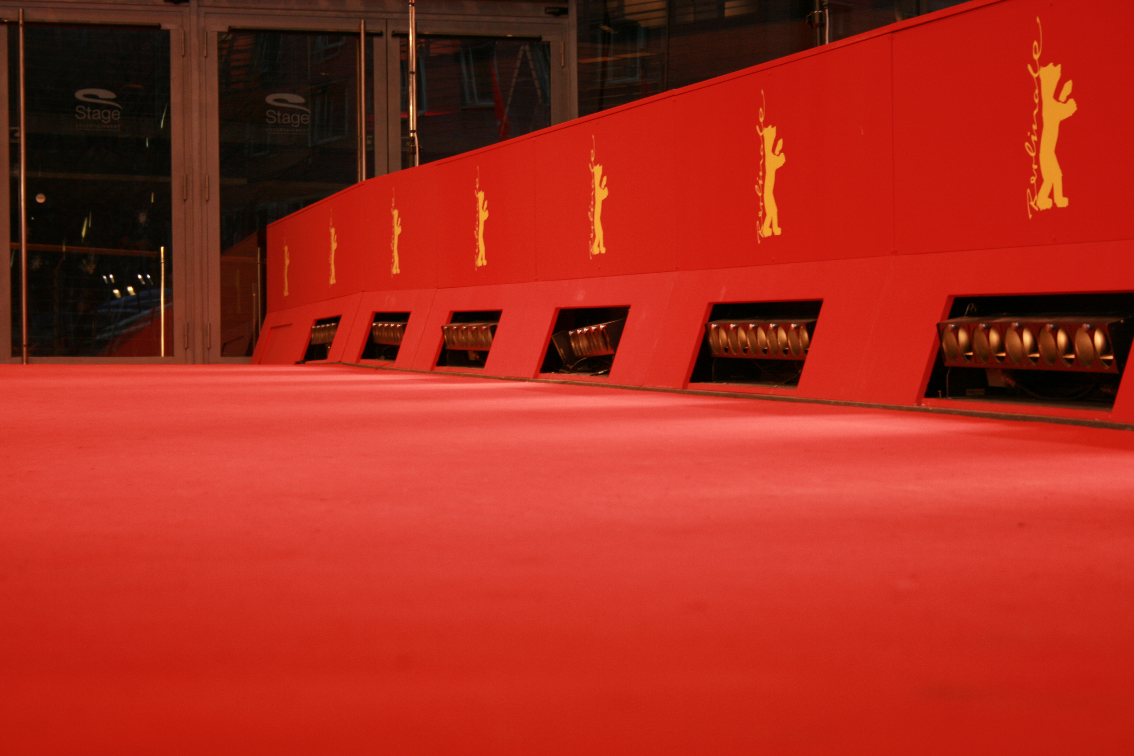 Berlinale 2013 . 63. Internationale Berliner Filmfestspiele - Photo: Alireza Rezvani Pictures . Web . Multimedia